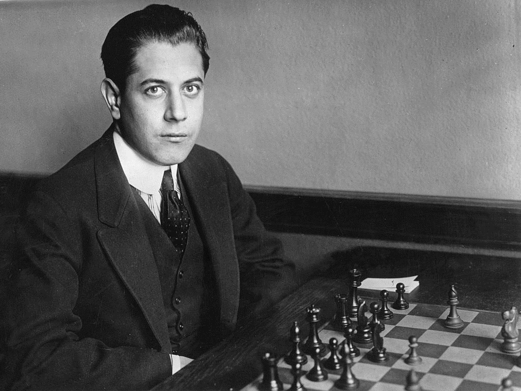 José Raúl Capablanca